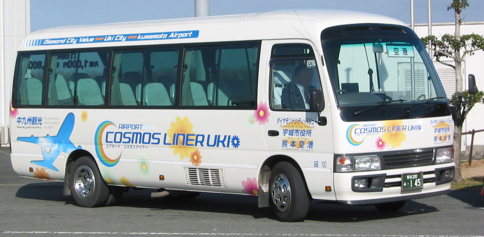 中九州観光 空港バス「コスモスライナー」の車両